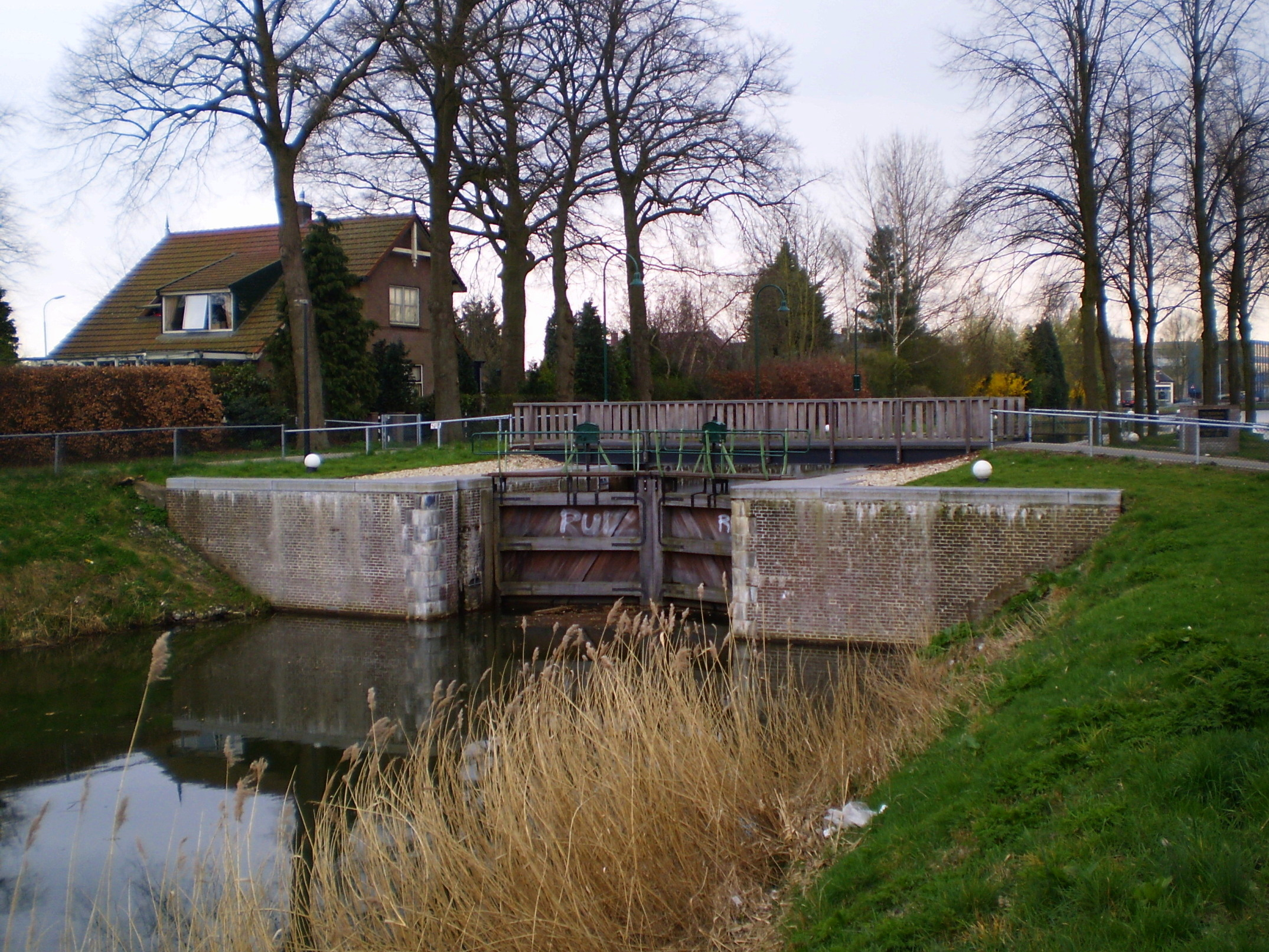 Apeldoornse Sluis/Lock in Apeldoorn Canal, Apeldoorn